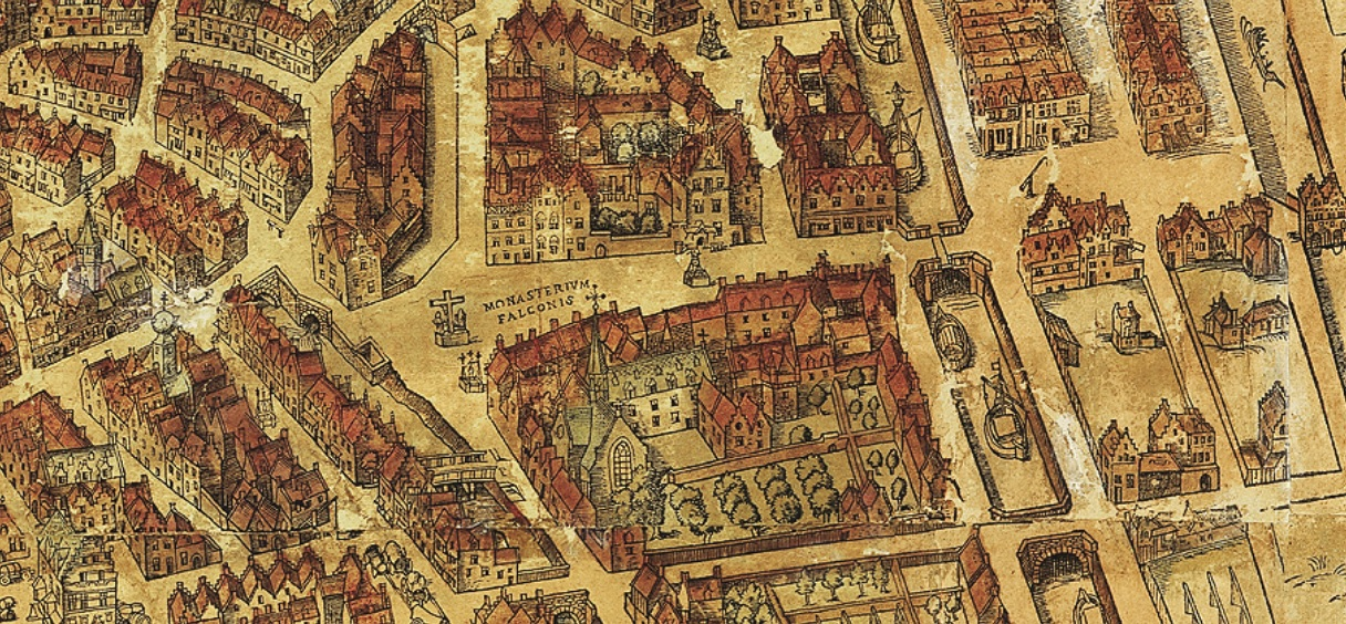 Het Falconklooster rond 1565